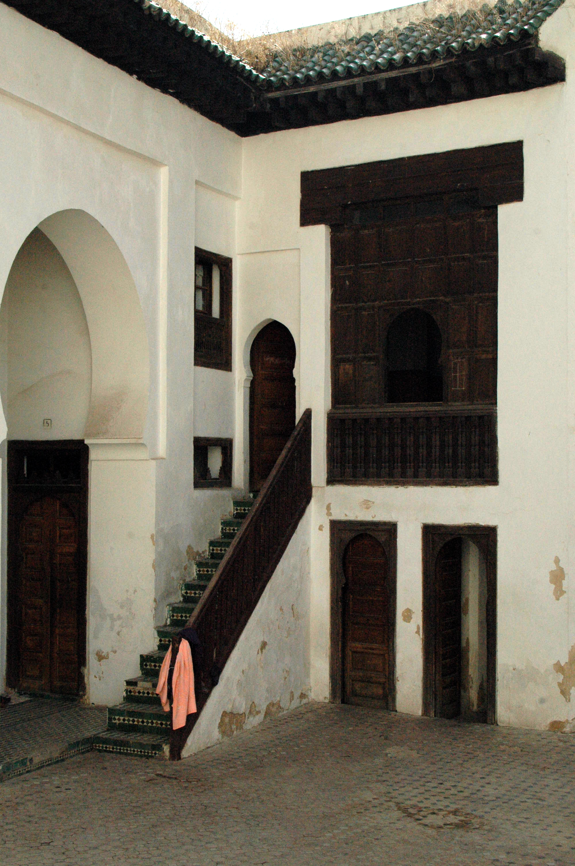 Madrasa Seffarine interior.